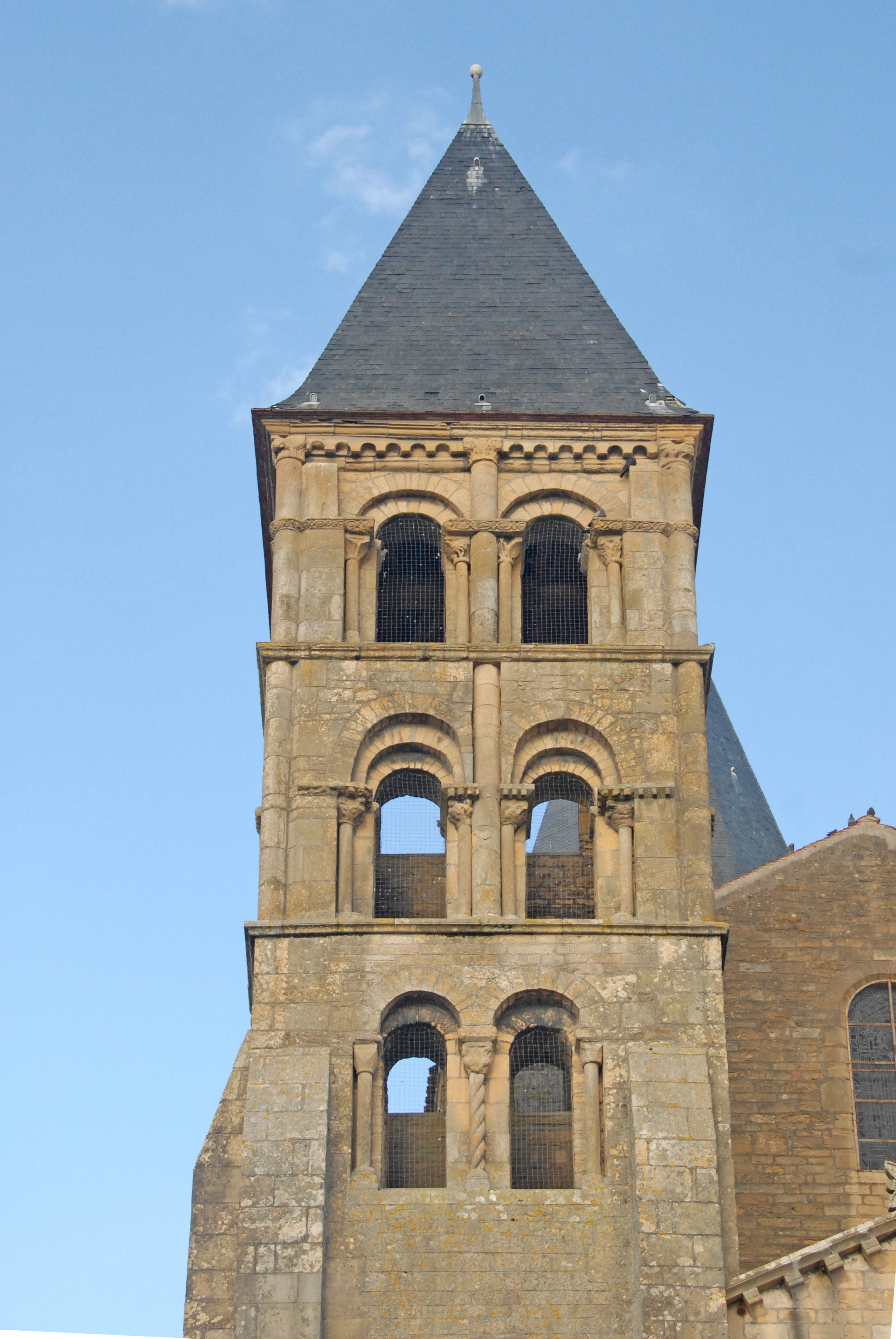 Nordturm Westwerk